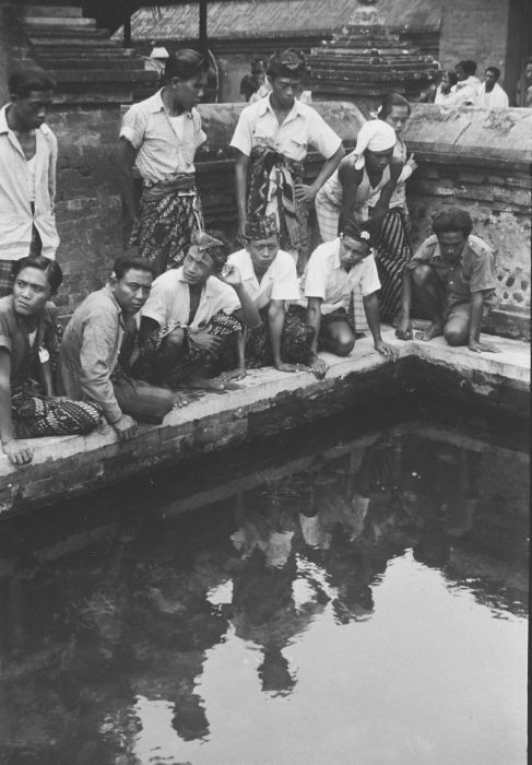 negatief. Bassin in een tempel waar heilige palingen worden vereerd, Lingsar